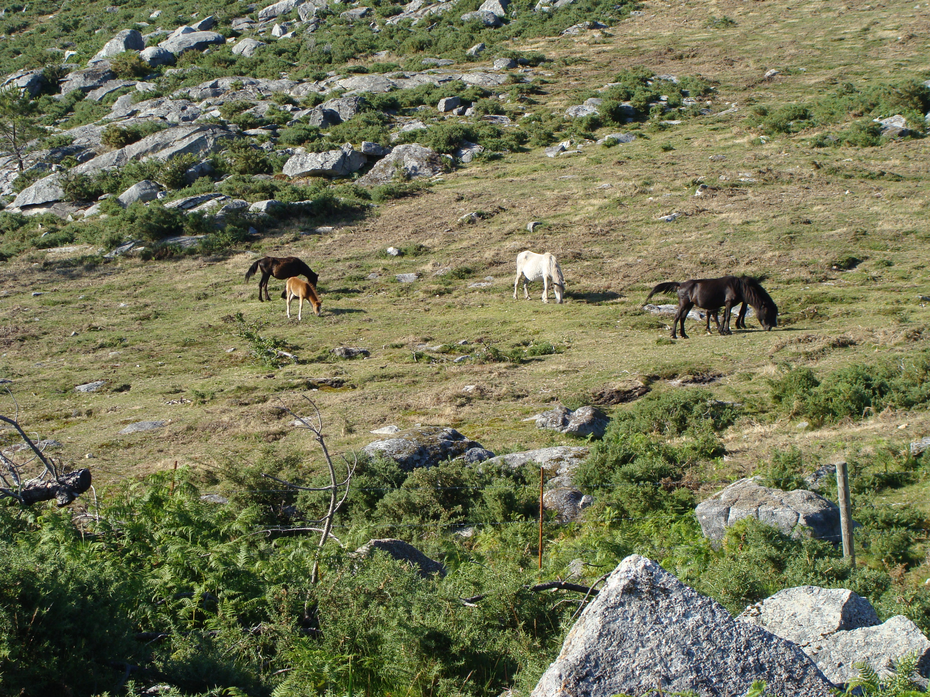 Caballos pastando junto a la carretera que conduce al Mirador de La Curota, en la Sierra de Brabanza, Galicia